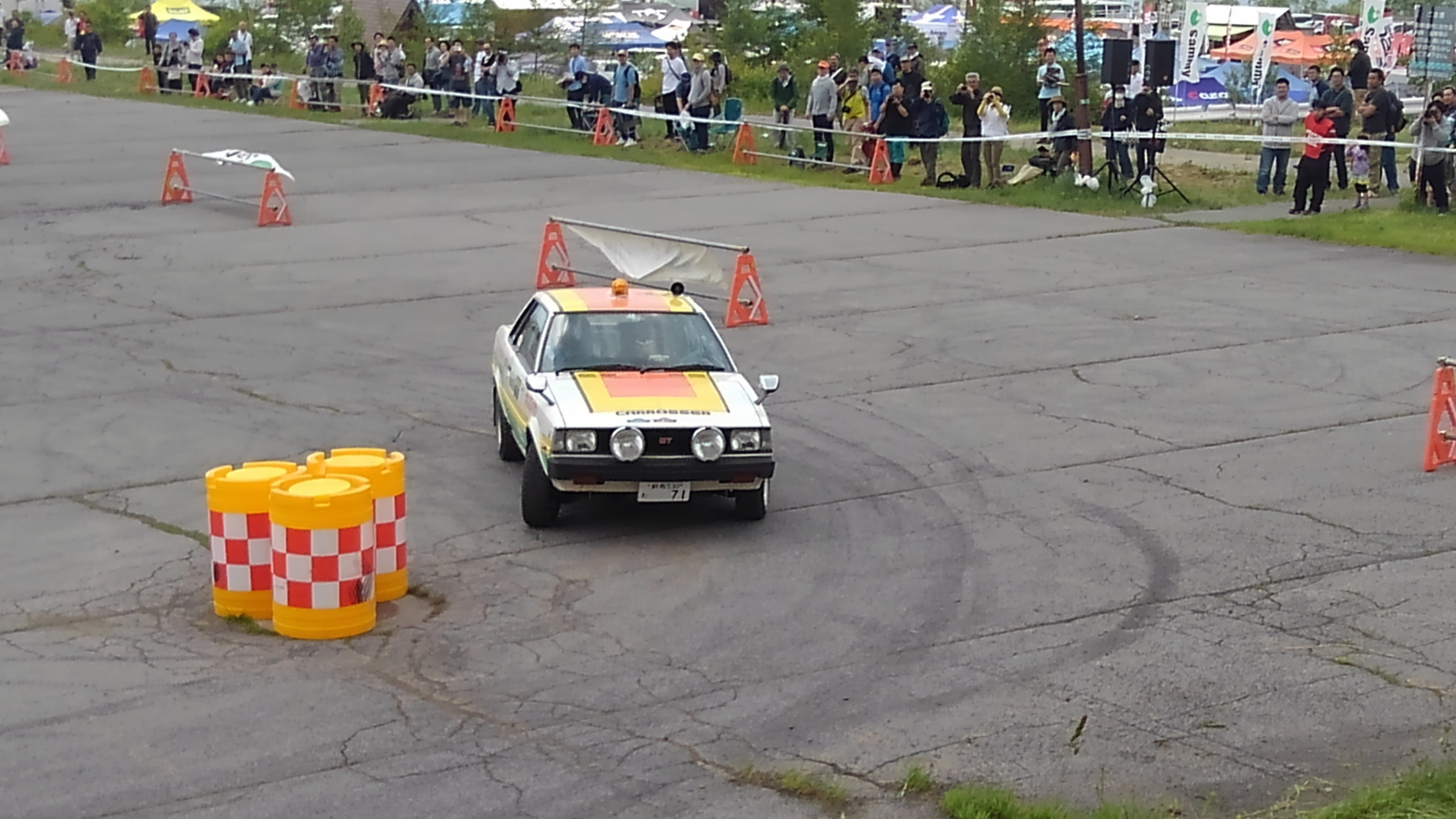 篠塚建次郎のドライブする0カー。